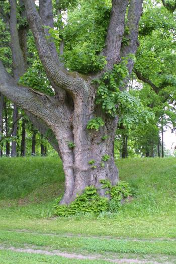 Lípa velkolistá v zámeckém parku v Chyši u Žlutic - detail kmene.